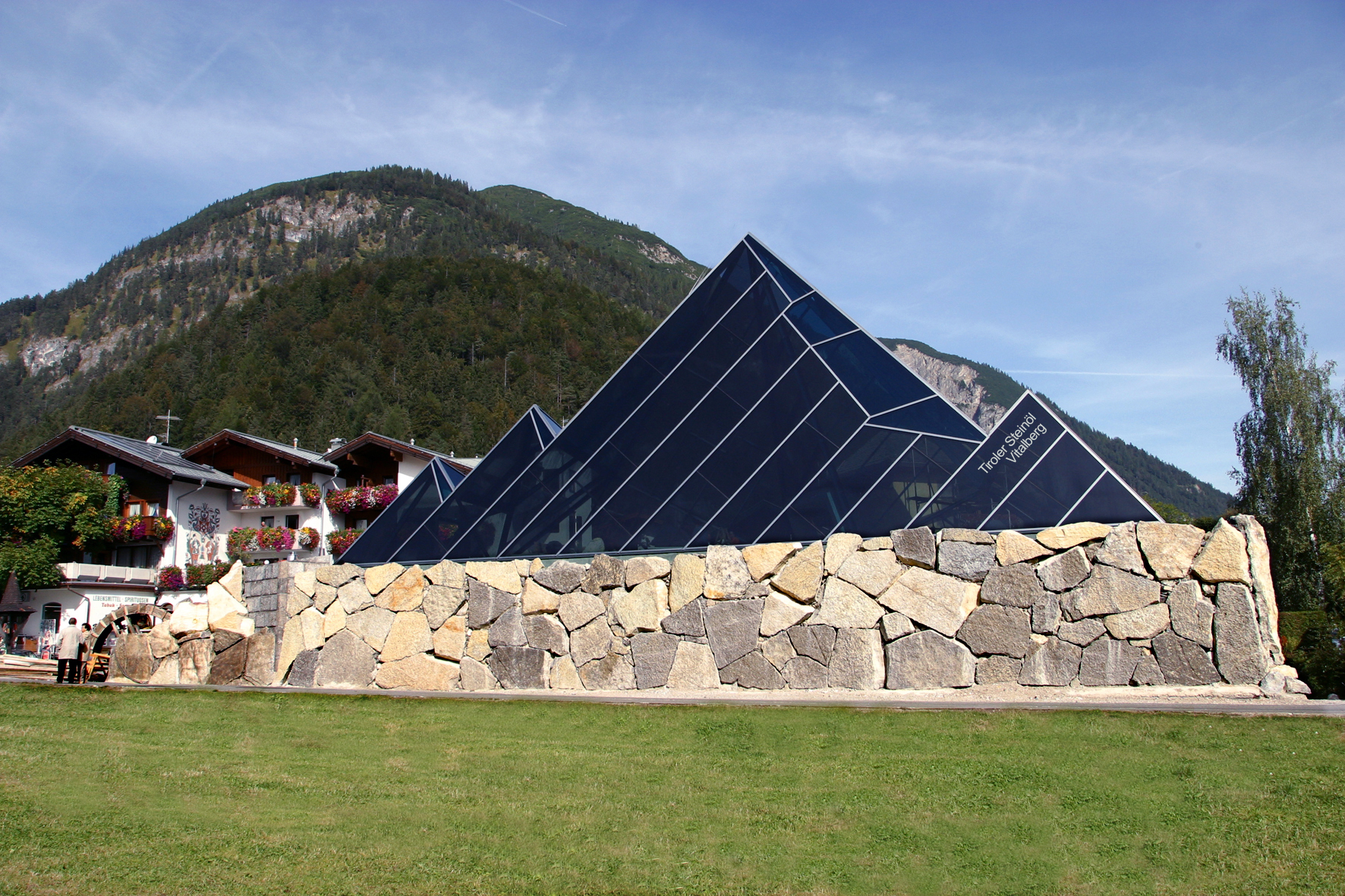 Erlebnismuseum Tiroler Steinöl Vitalberg in Pertisau am Achensee